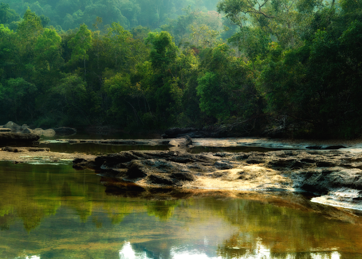 Penta 45F, Leaf Aptus, Xenar 150/4.5